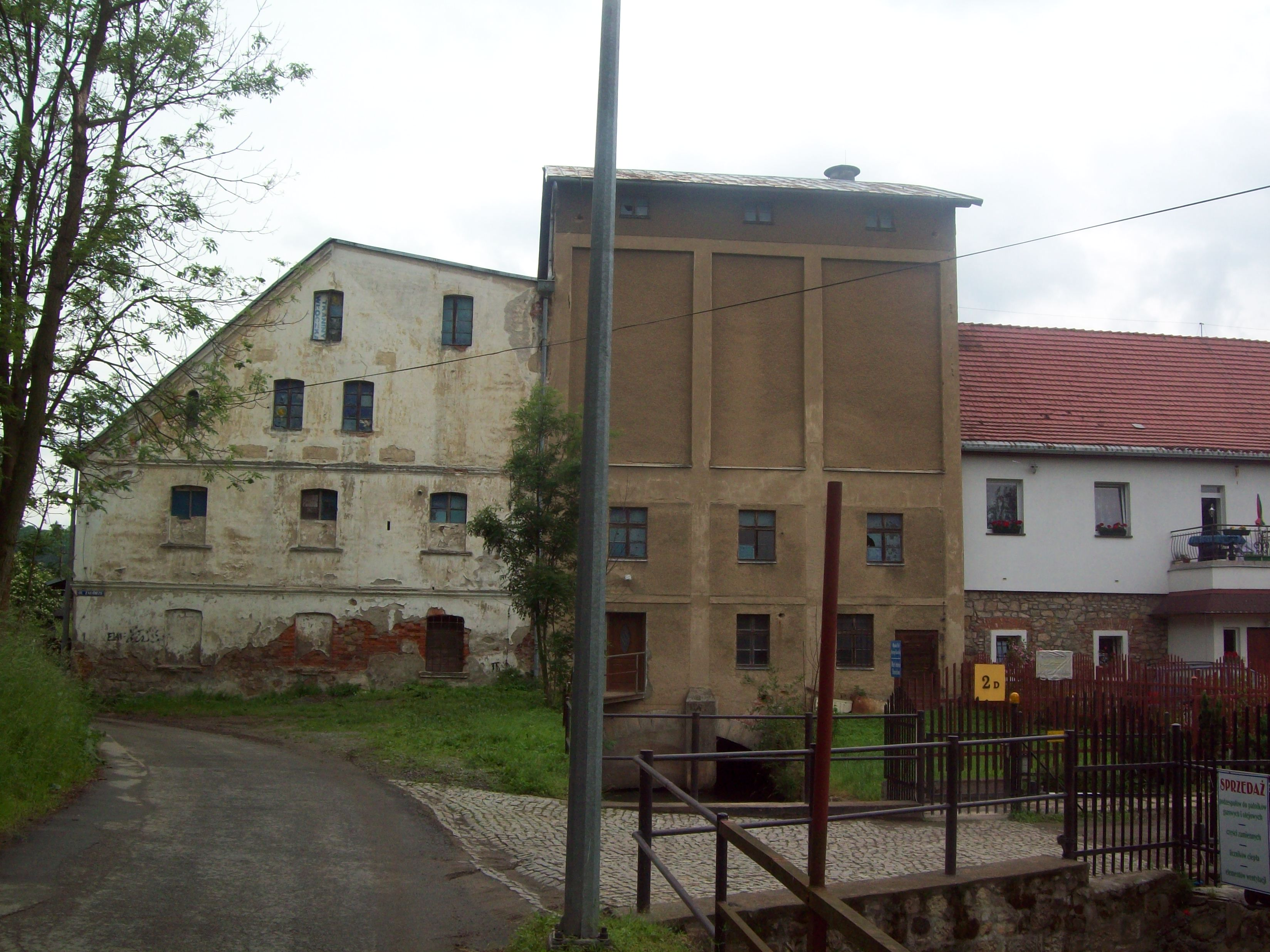 Młyn na kłodzkim Zagórzu